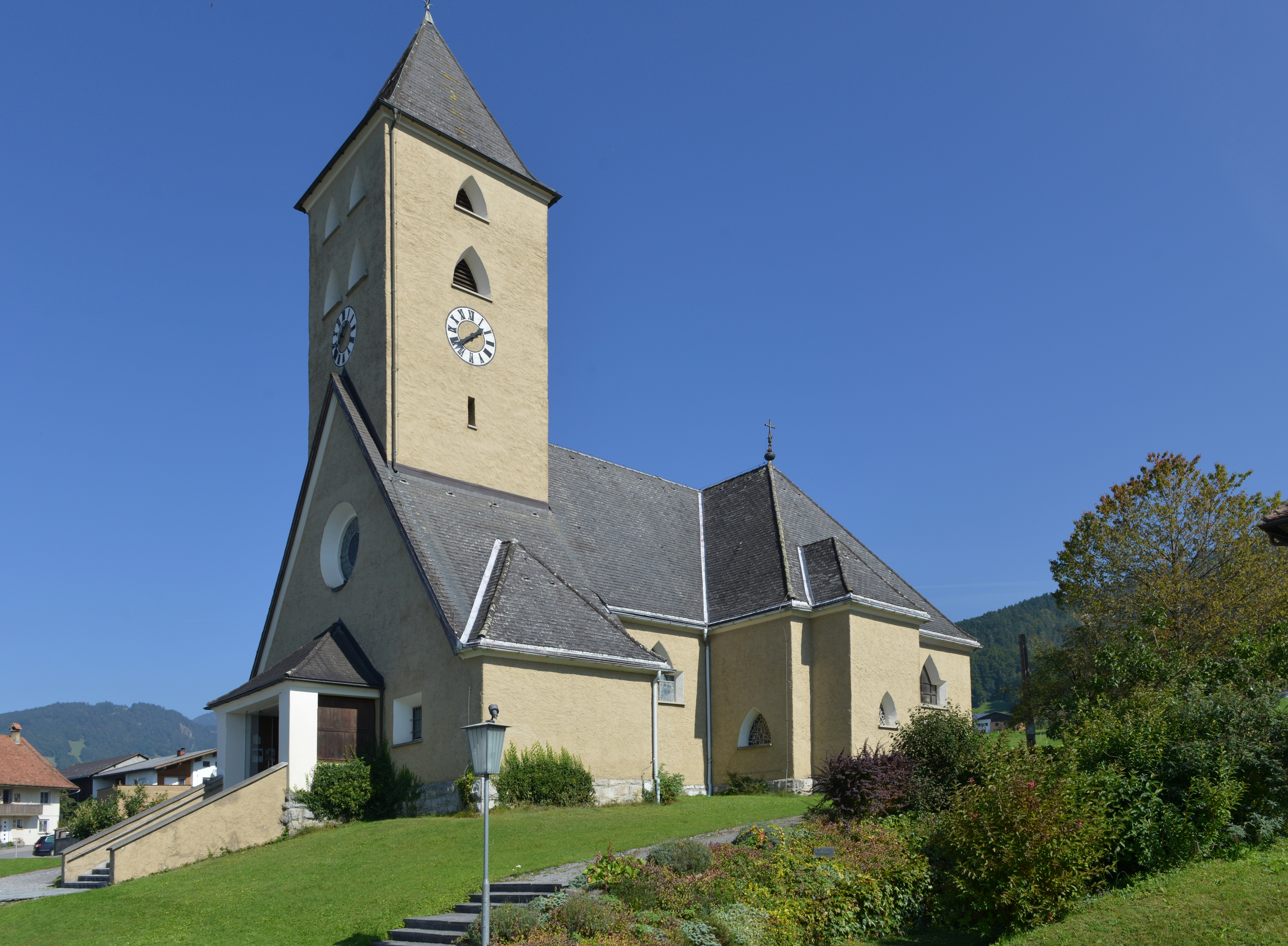 Pfarrkirche zum "Hl. Johannes dem Täufer" in Zwischenwasser - Batschuns erbaut 1921-23 nach Plänen von Clemens Holzmeister.